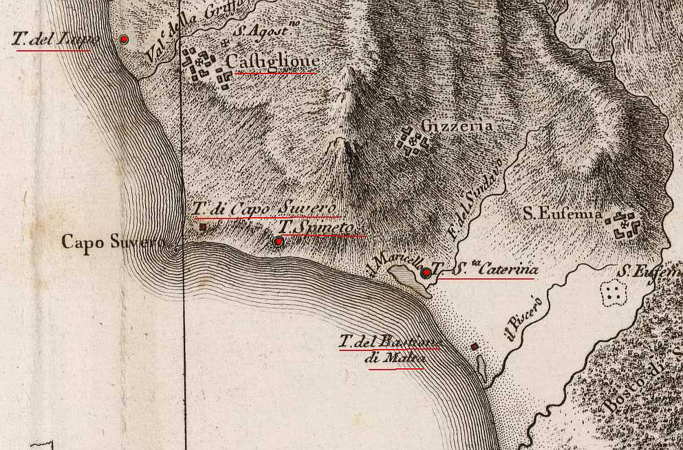 Atlante geografico del regno di Napoli. 1808 Autore: Rizzi Zannoni, Giovanni Antonio (1736-1814) Editore: Giuseppe Guerra - Napoli